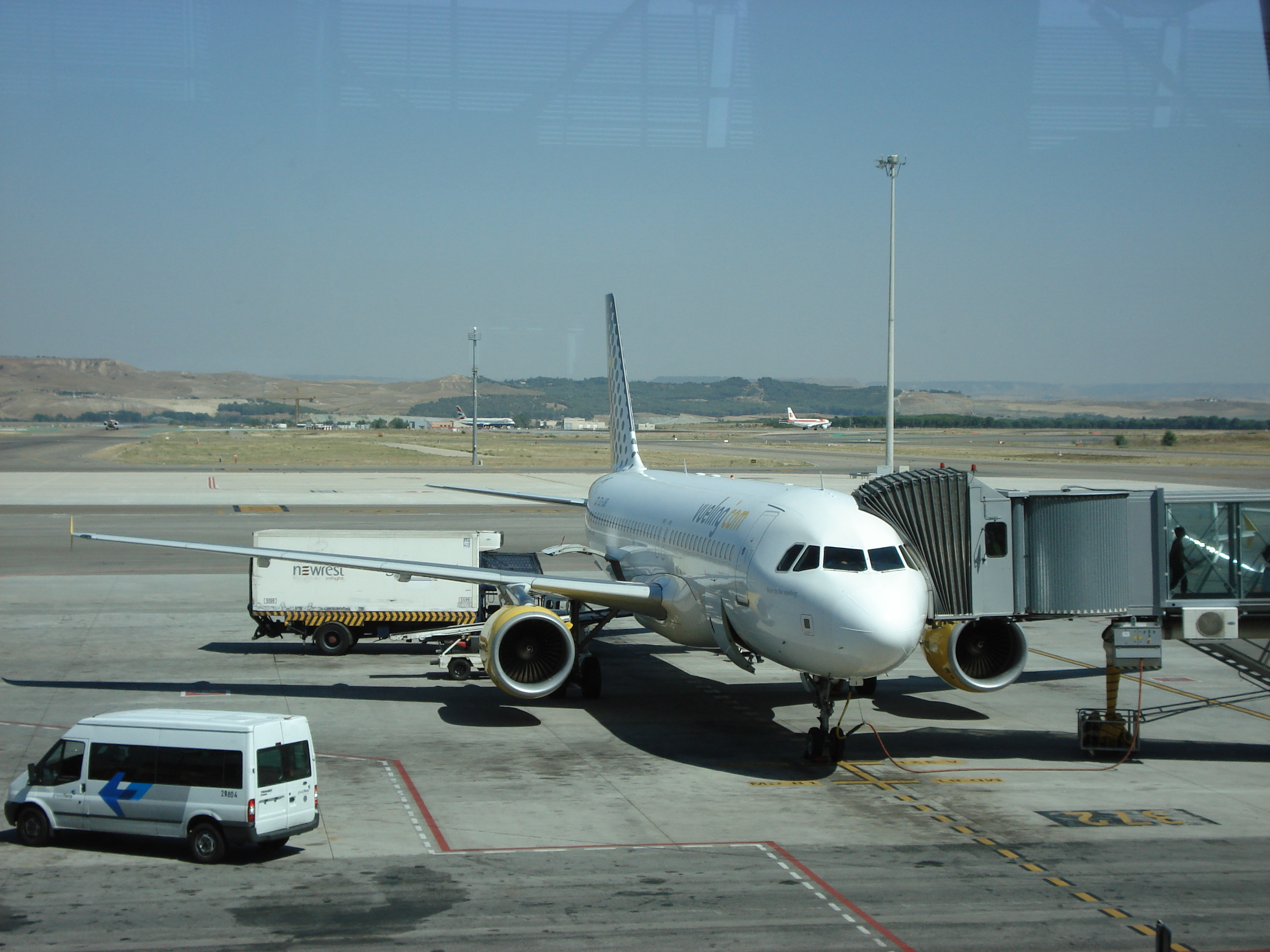 Born to be vueling en MAD